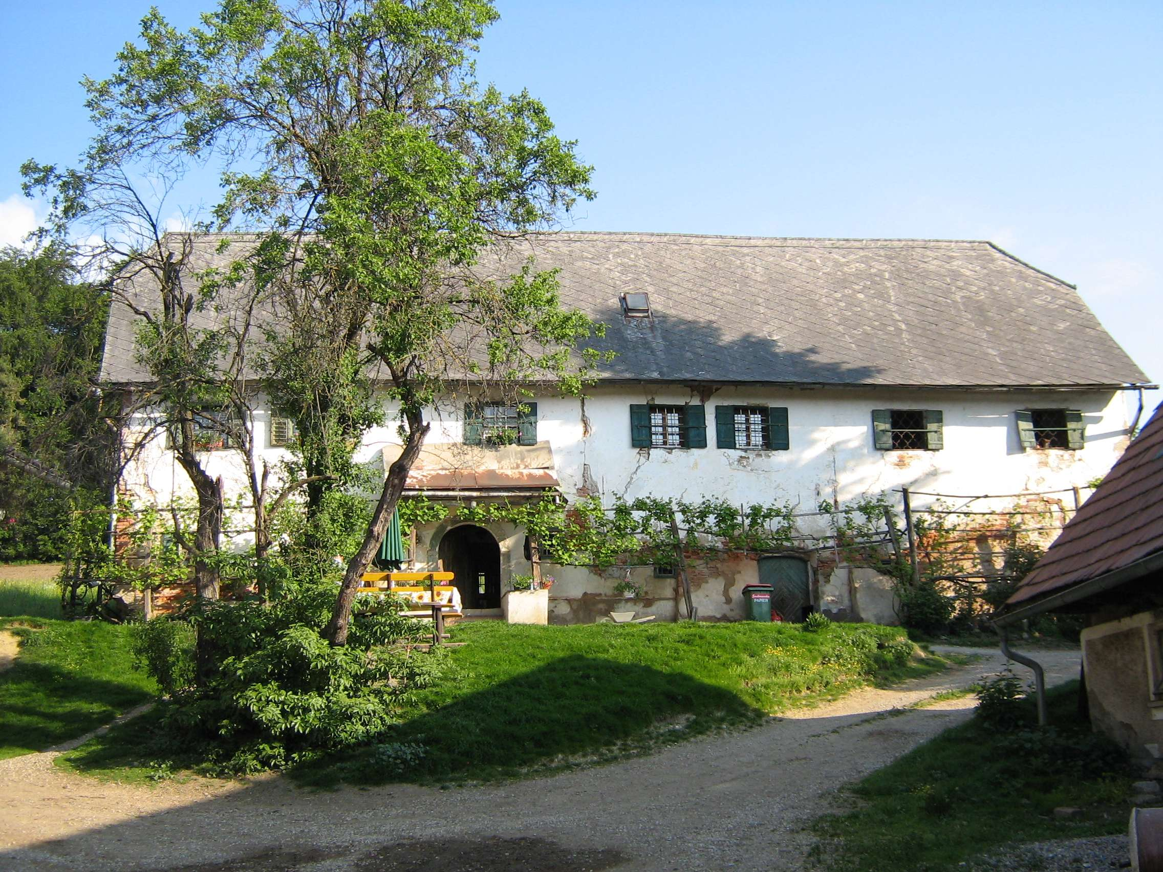 Bauernhaus Tanzer mit Wachsfigur Jesuskind in barockem Schrein